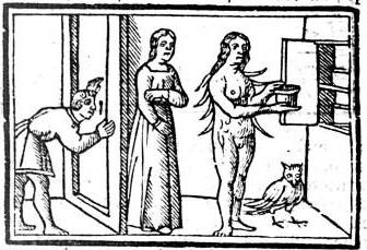 Titre : [Illustrations de Apuleo vulgare dell'Asino d'oro] / [Non identifié] ; Lucio Apulée, aut. du texte Auteur : Apulée (0125-0180?). Auteur du texte Éditeur : Nicolo di Aristotile (Venise) Date d'édition : 1537 Sujet : Apulée (0125-0180?). Métamorphoses Type : Figures allégoriques,image fixe Langue : Italien Format : 68 est. : gravures sur bois : N. et b. ; 13 x 8,3 cm et moins Format : image/jpeg Droits : domaine public